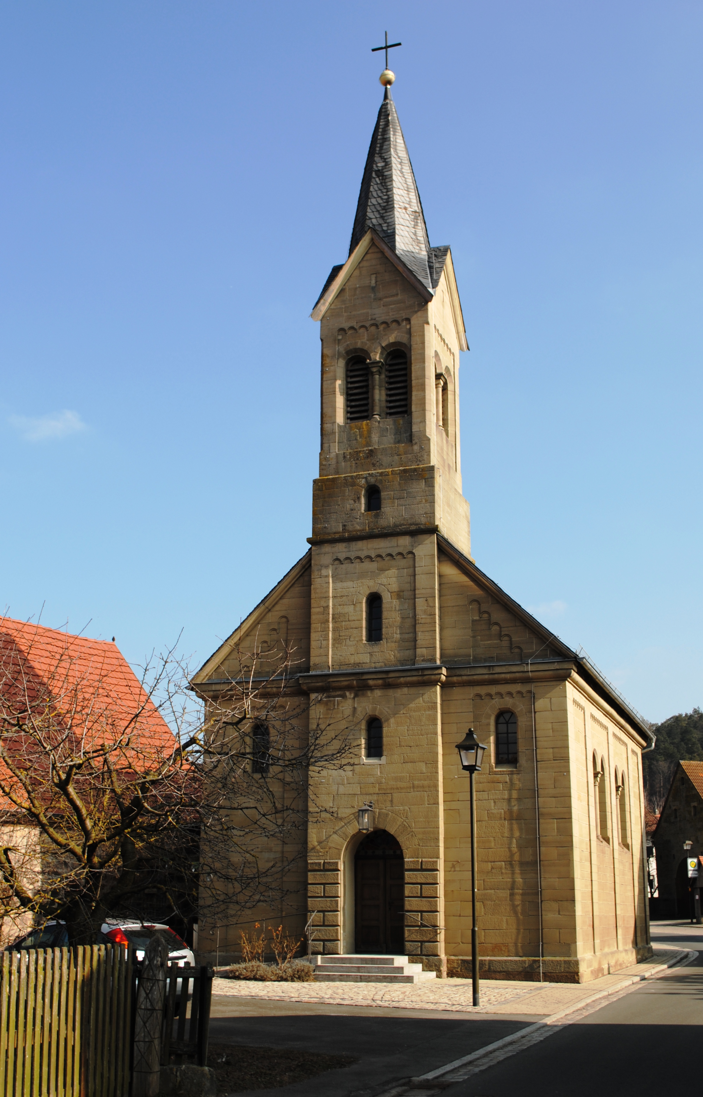 Katholische Kapelle Beatae Mariae Virginis, GräfenneusesThis is a photograph of an architectural monument.